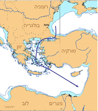 אוניית המעפילים רודניצ'אר - מסלול